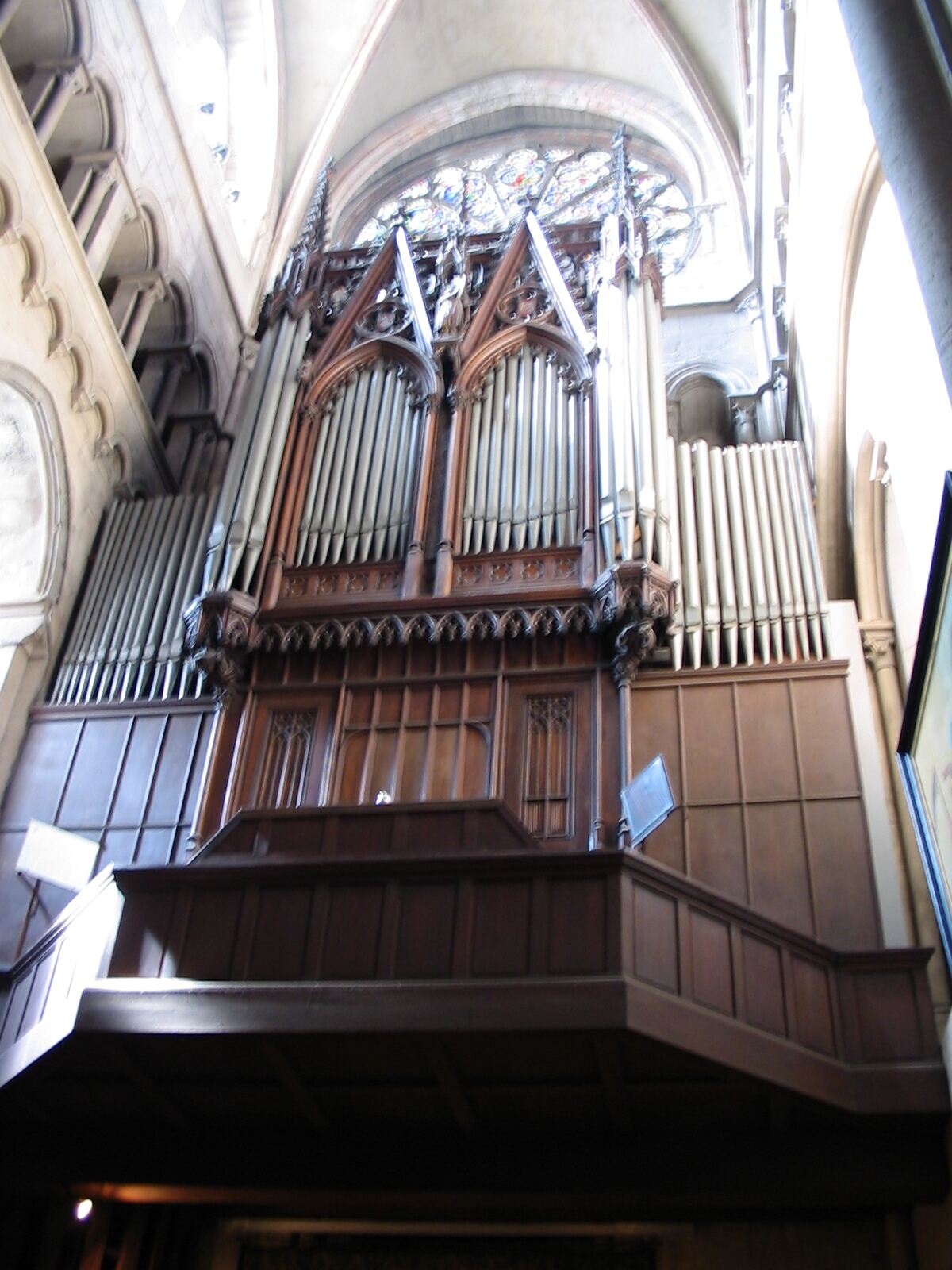 Orgue de la cathédrale Saint-Jean de Lyon construit en 1841 par la manufacture Daublaine & Callinet - Édouard Commette, titulaire de 1904 à 1963.